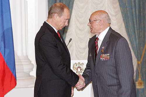 Советскому разведчику Алексею Ботяну присвоено звание Героя России